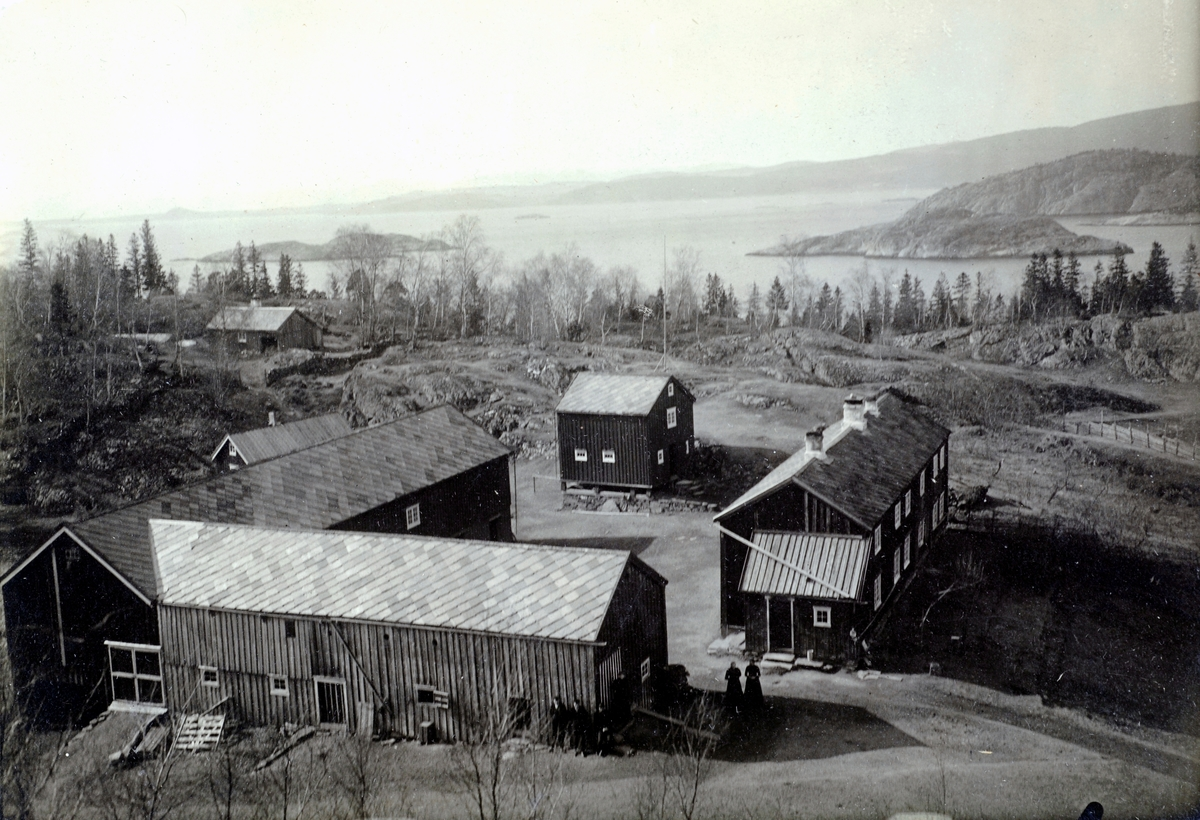 Gården Saltøy (gnr. 1) på Saltøy i daværende Skatval kommune.